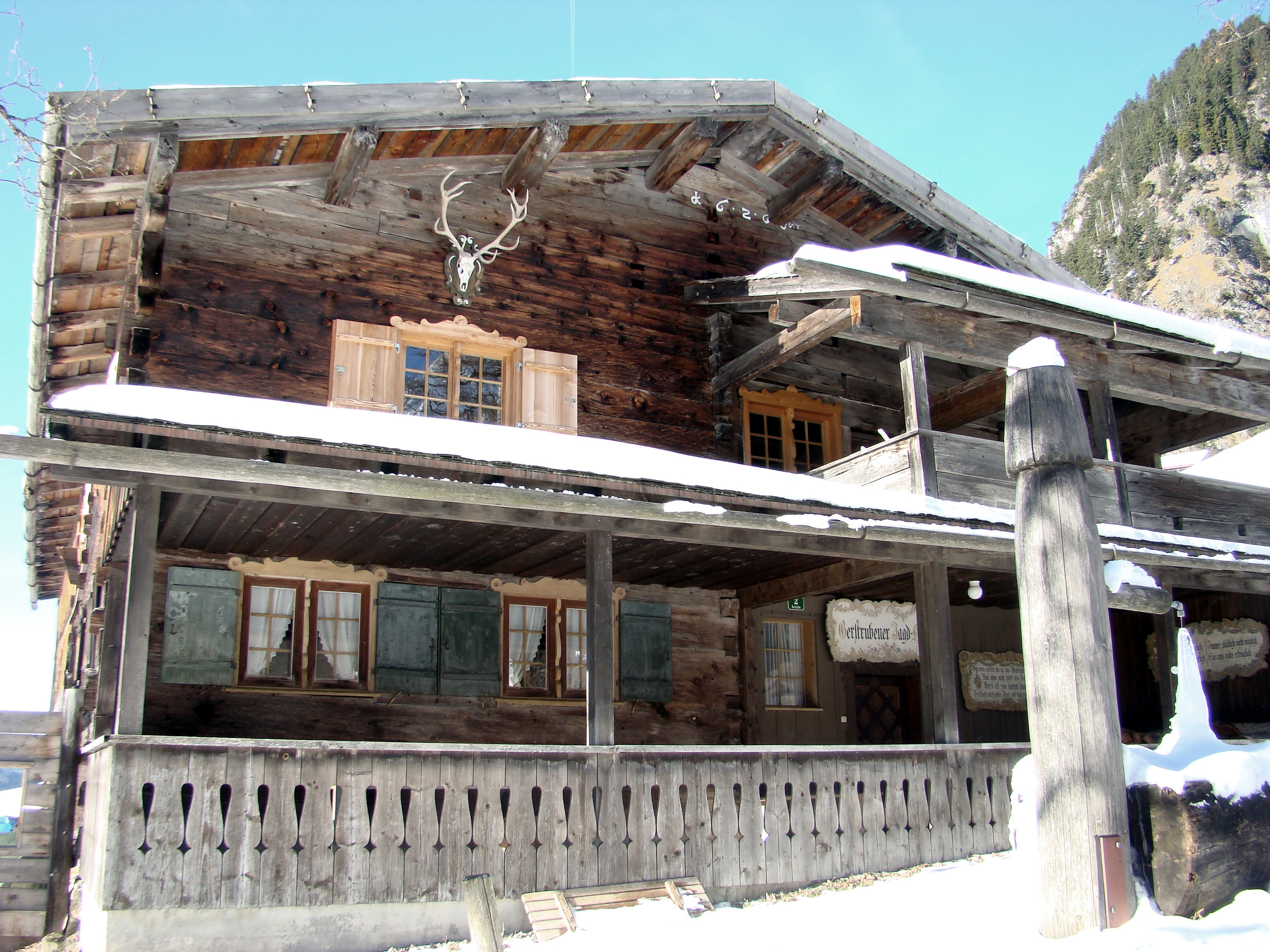 Ehemaliges Bauernhaus, Gerstruben Nr. 2, Oberstdorf. Im Jahre 1896 ging es das gesamte Tal und somit auch Haus Nr. 2 in den Besitz des Freiherrn Cornelius Wilhelm von Heyl zu Herrnsheim (1843 - 1923) über, der das Gebiet zu Jagd nutzte. Das Haus Nummer 2 wurde zu seiner Sommerresidenz und es wird deshalb auch heute noch "Baronehüs" genannt. Nach seinem Tod betrieben seine Söhne Cornelius und Max die Jagd weiter. Besonders Max' Ehefrau Annelie schien die Sommerfrische sehr oft genutzt zu haben. Sie verkaufte nach dem Tode ihres Mannes 1953 den Heylschen Besitz an den Verein der Oberstdorfer Rechtler. So blieb das Haus, das heute unter Denkmalschutz steht und verpachtet ist, bestehen. Tafel über der Eingangstüre Haus Nr.2